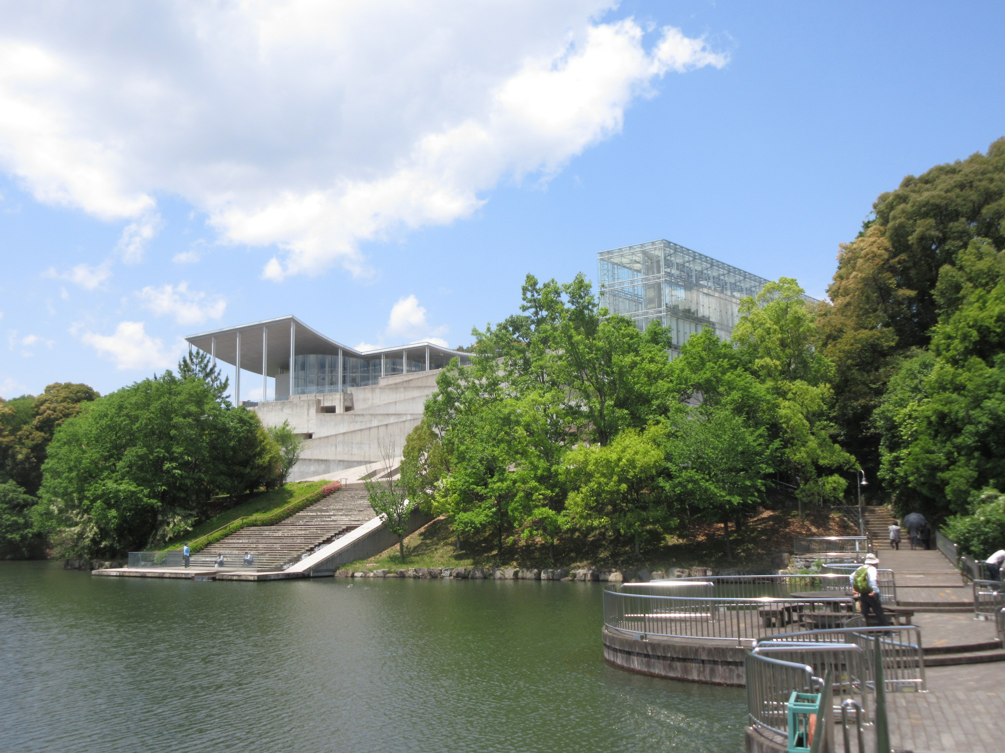 岡崎市美術博物館